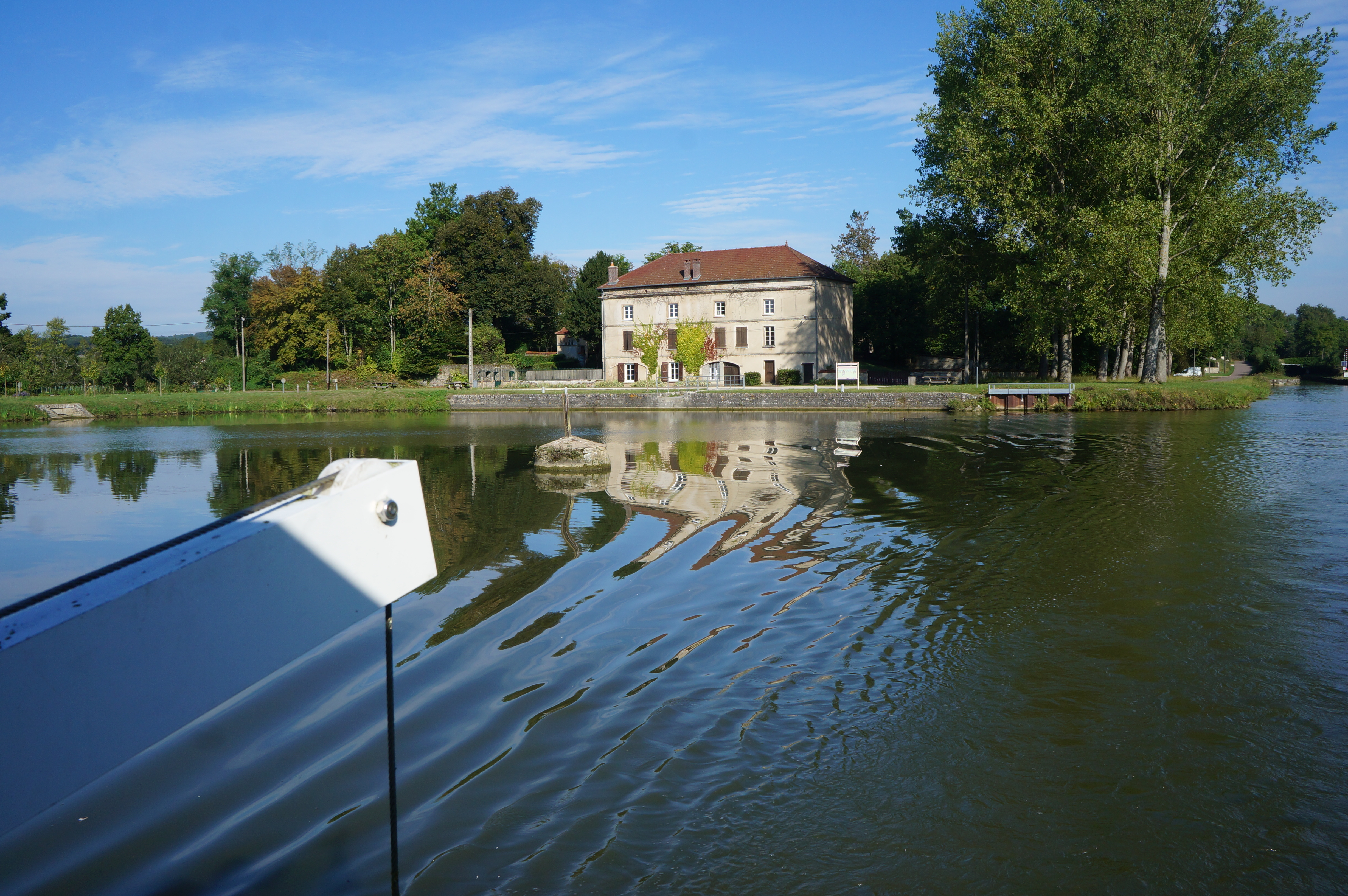 Le port d'Escommes à Maconge. Vue vers le nord-ouest. La maison visible ici est appelée "maison des ingénieurs" ; c'est une ancienne cimenterie qui a dû son existence au canal, et qui se trouve sur le territoire de la commune de Créancey.